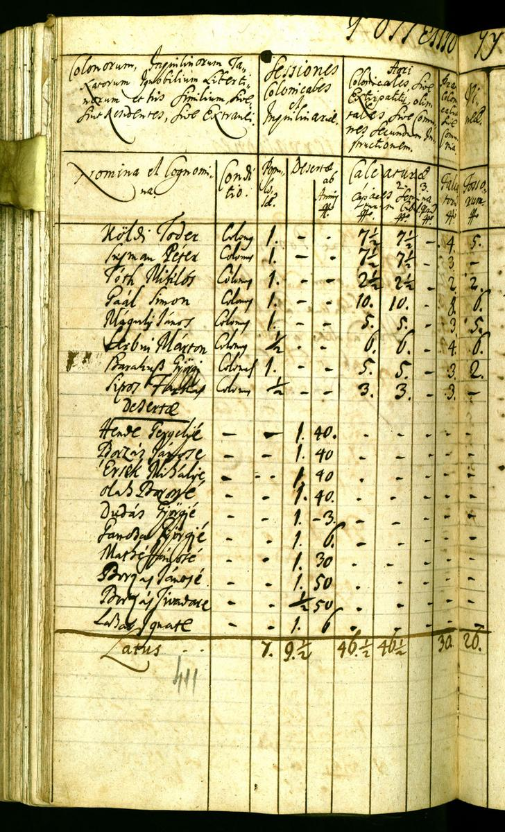 Census 1715 in Giurtelecu Simleului